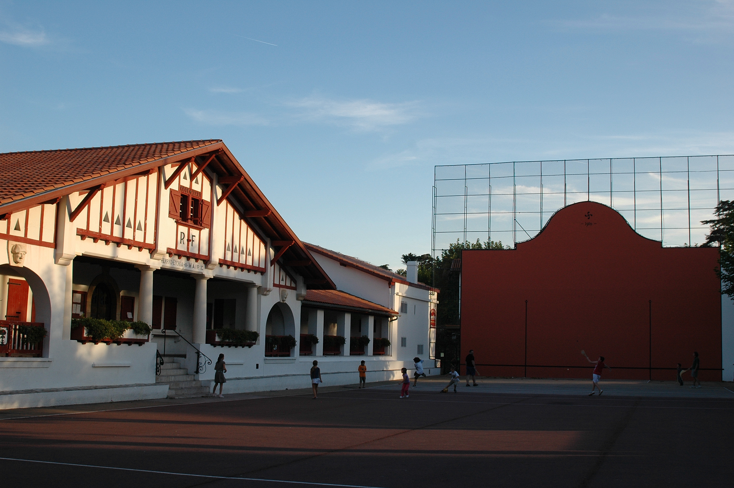 Guéthary, la mairie et le fronton place libre. Photo prise le 15/10/06 par Harrieta171